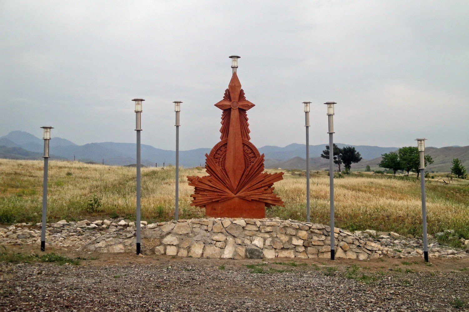 Djrakan (Djebrail), Memorial Cross, 2014.05.09